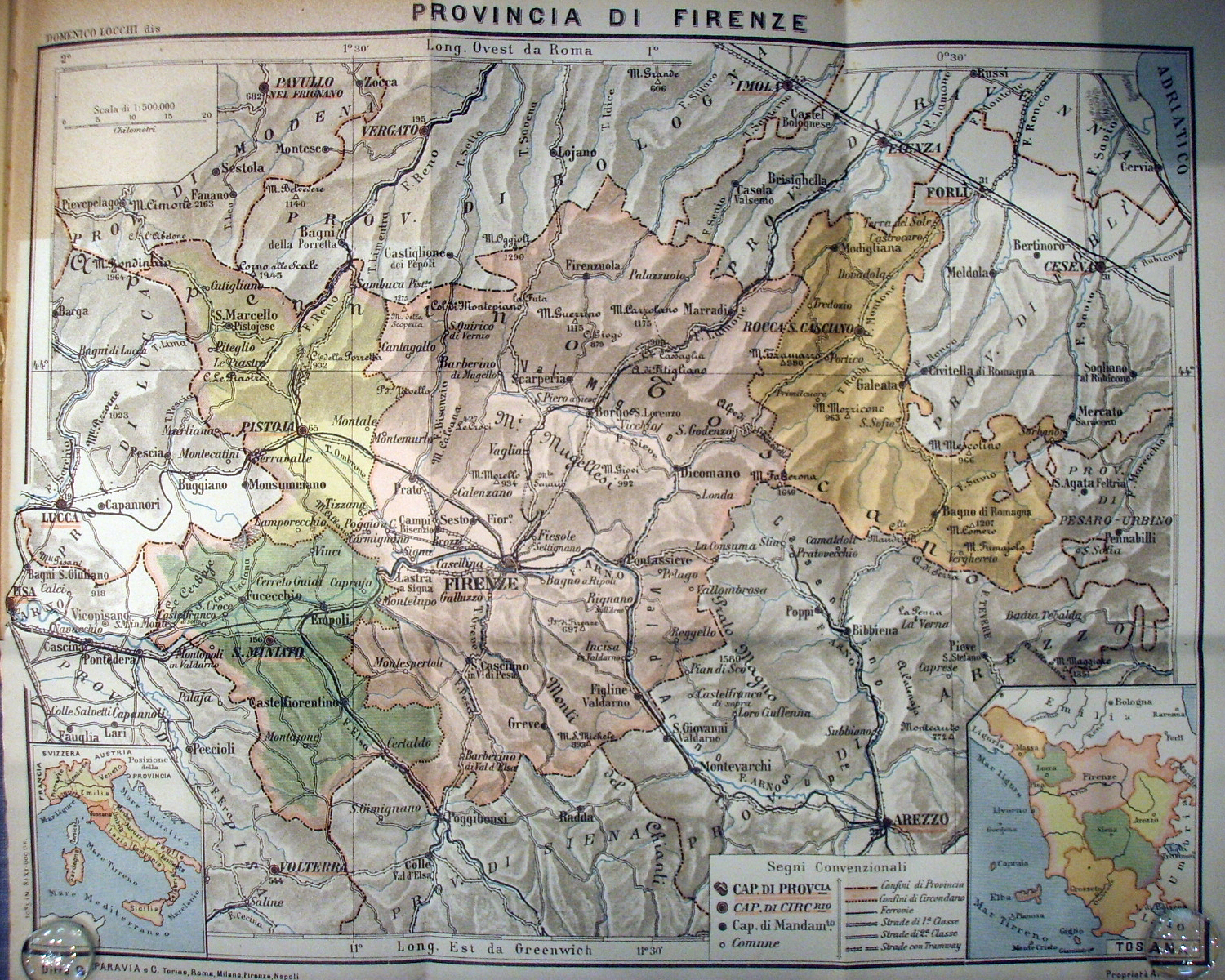 Biblioteca marucelliana, provincia di firenze nel 1924